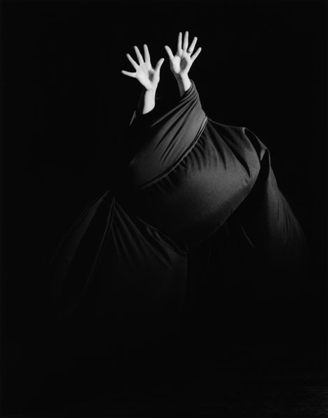 Shani Ha